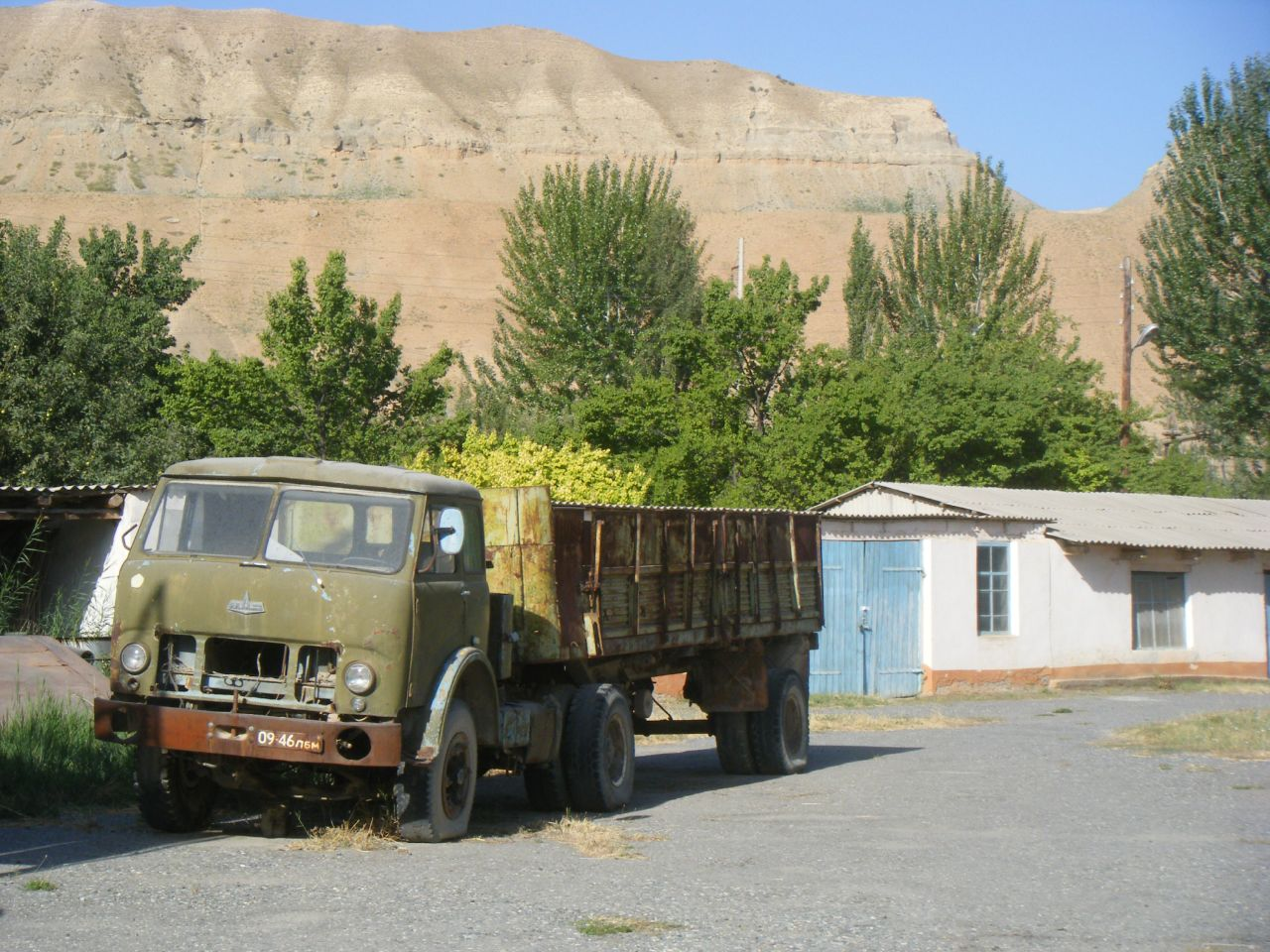 MAZ truck in Leninobod, Tajikistan.